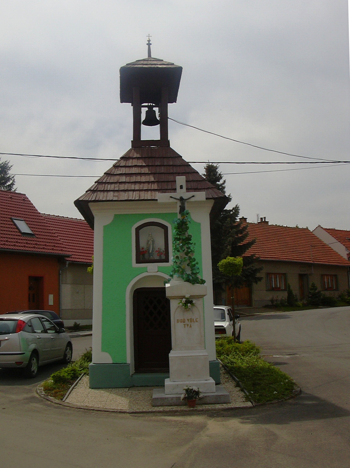 Zvonice, Moravské Málkovice (Vyškov District - Czech Republic)